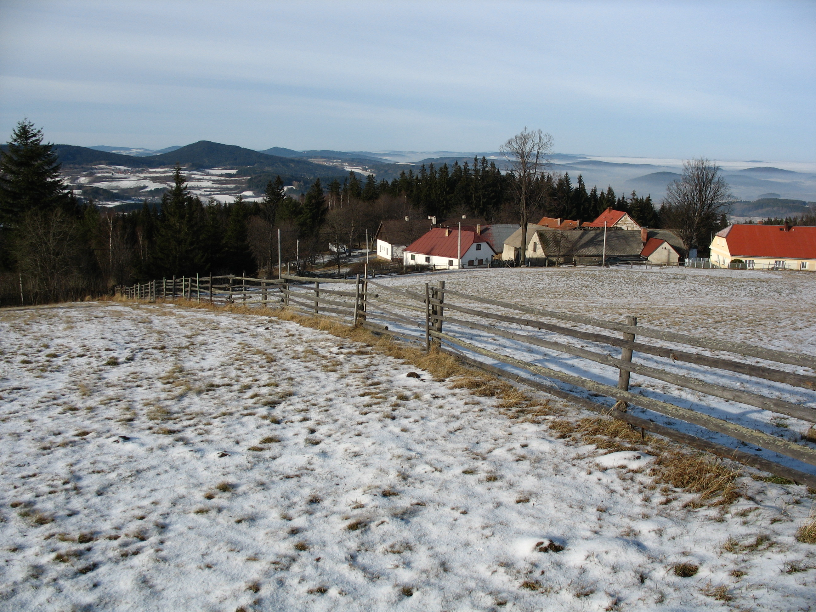 Vesnice Zuklín v okrese Klatovy, v pozadí hory Sedlo a Svatobor